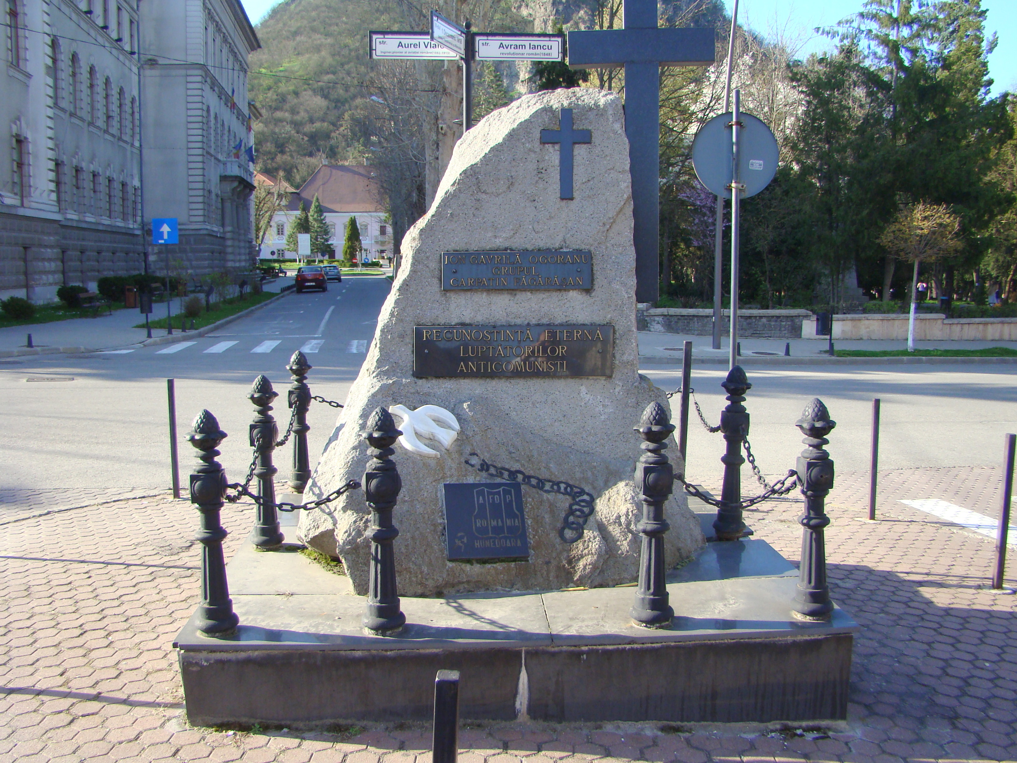 Monumentul luptătorilor anticomunişti din Deva